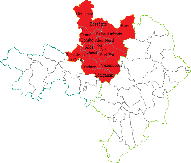 Carte des cantons composant l'arrondissement d'Alès (Gard)